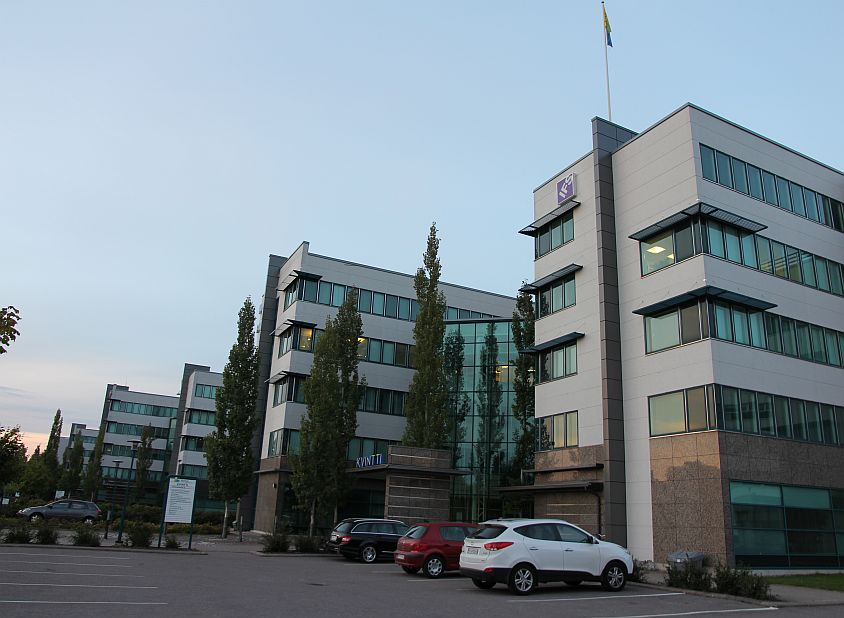 Yrityskeskus Spektri Espoon Pohjois-Tapiolassa (Kehä I:n vieressä). Kuvassa tämän yrityskeskuksen rakennukset Duo (taaimpana), Trio, Kvintti ja Kvartti (lähin). Kuvan vasemmalle puolelle jää kokonaisuuteen kuuluva Pilotti-rakennus. Huom: Muista säilyttää viittaus kuvaajaan, mikäli käytät kuvaa.